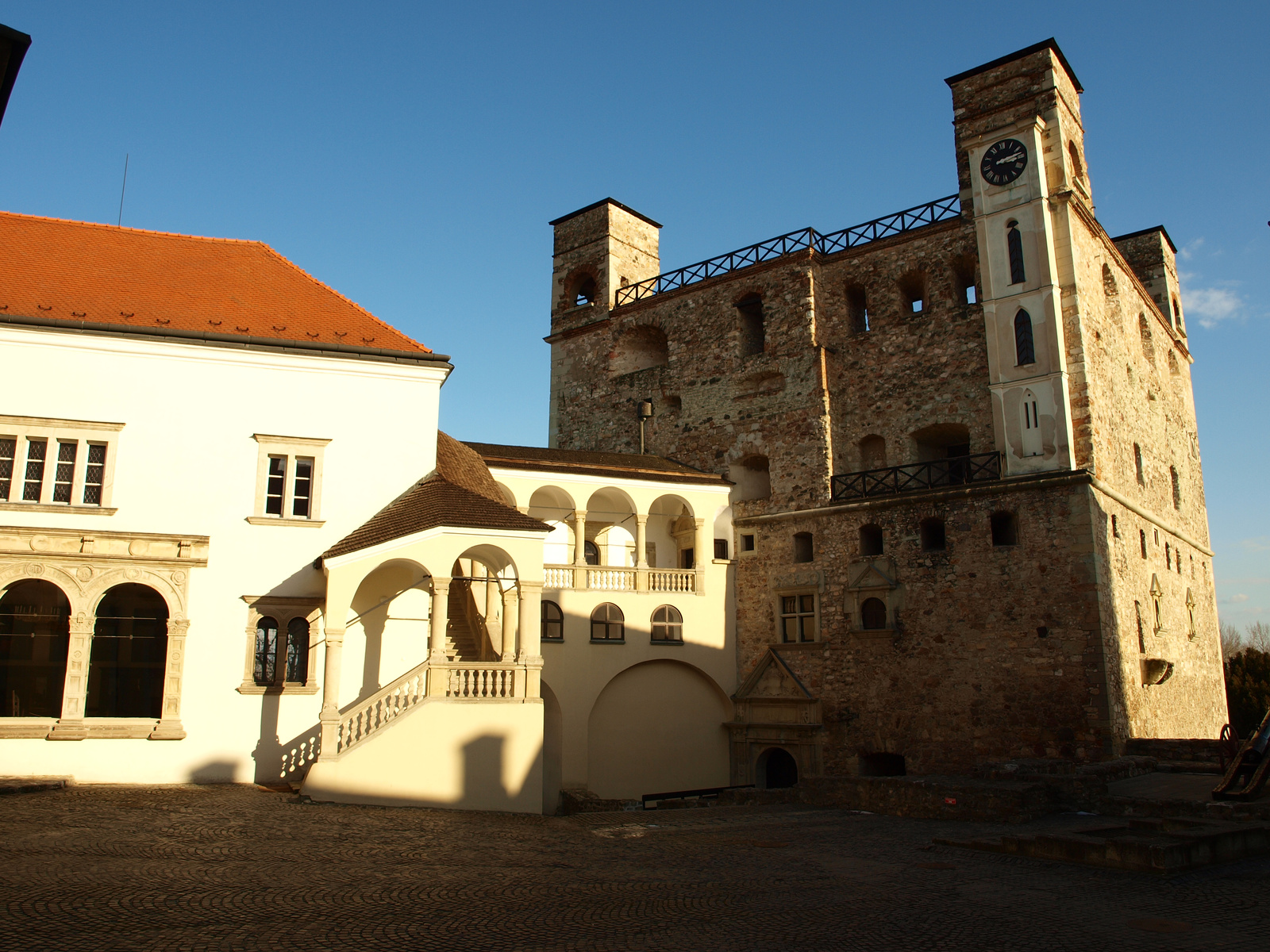 olaszbástya és a Lórántffy-loggia, Rákóczi-vár, Sárospatak This is a photo of a monument in Hungary, Identifier: 18069 This is a photo of a monument in Hungary, Identifier: 18071